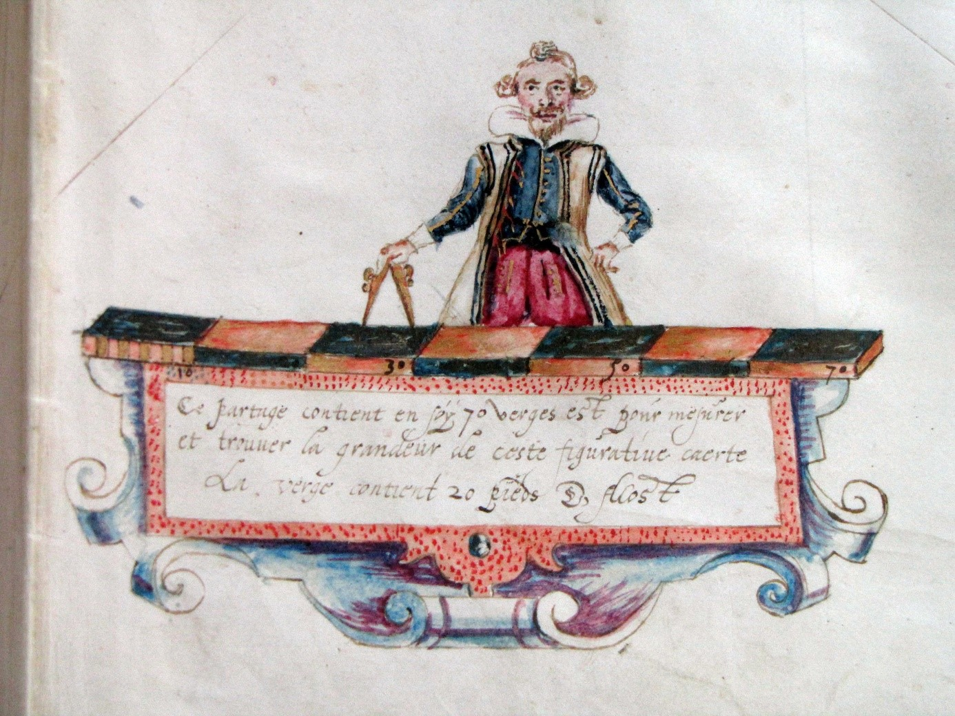 Zelfportret van Philips de Dijn op kaart van de abdij van Ninove (1624)